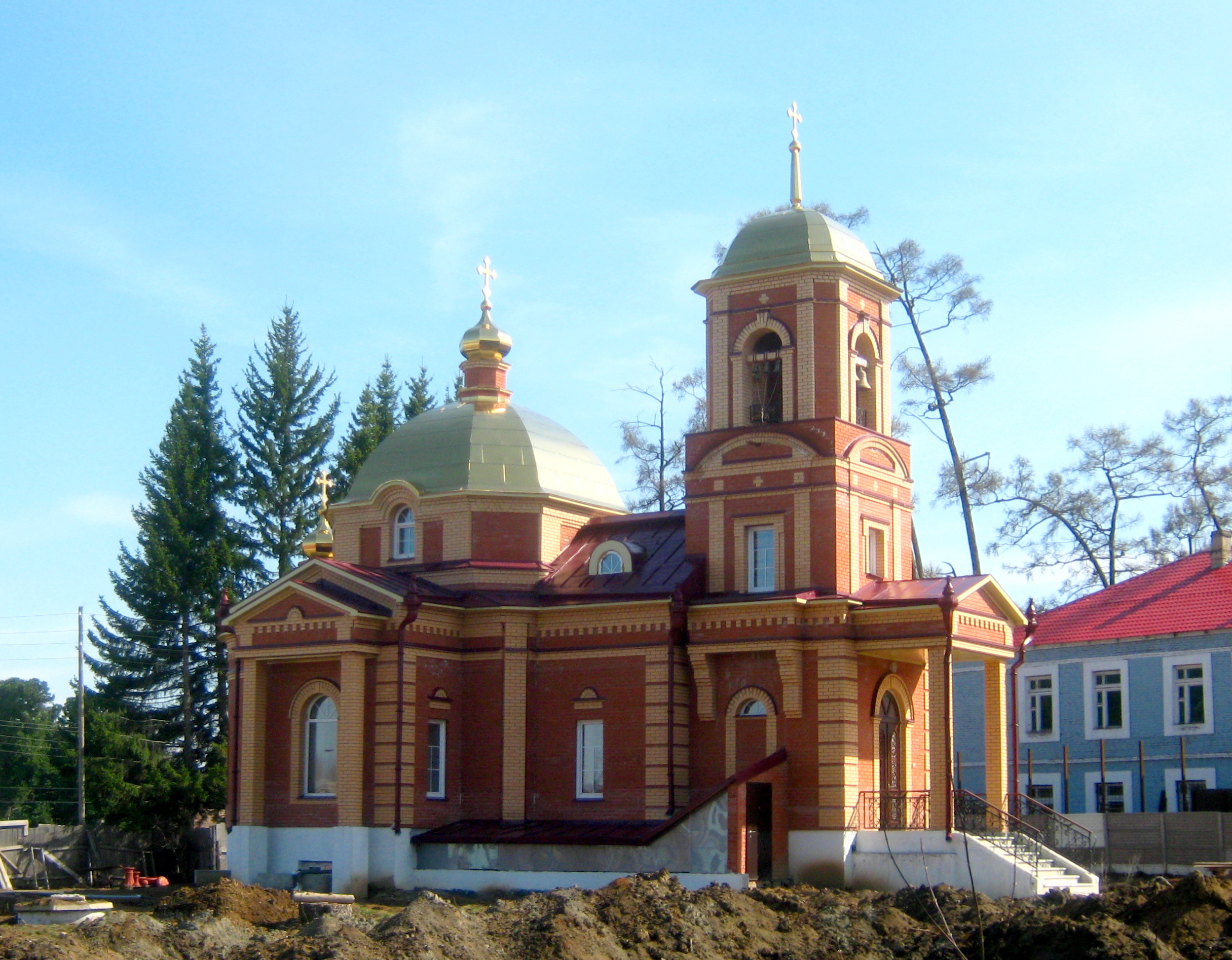 Церковь св. Татианы Гримблит, Богашёво